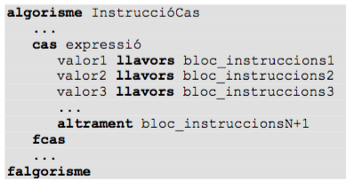 algorisme cas